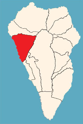 Localización del municipio de Tijarafe